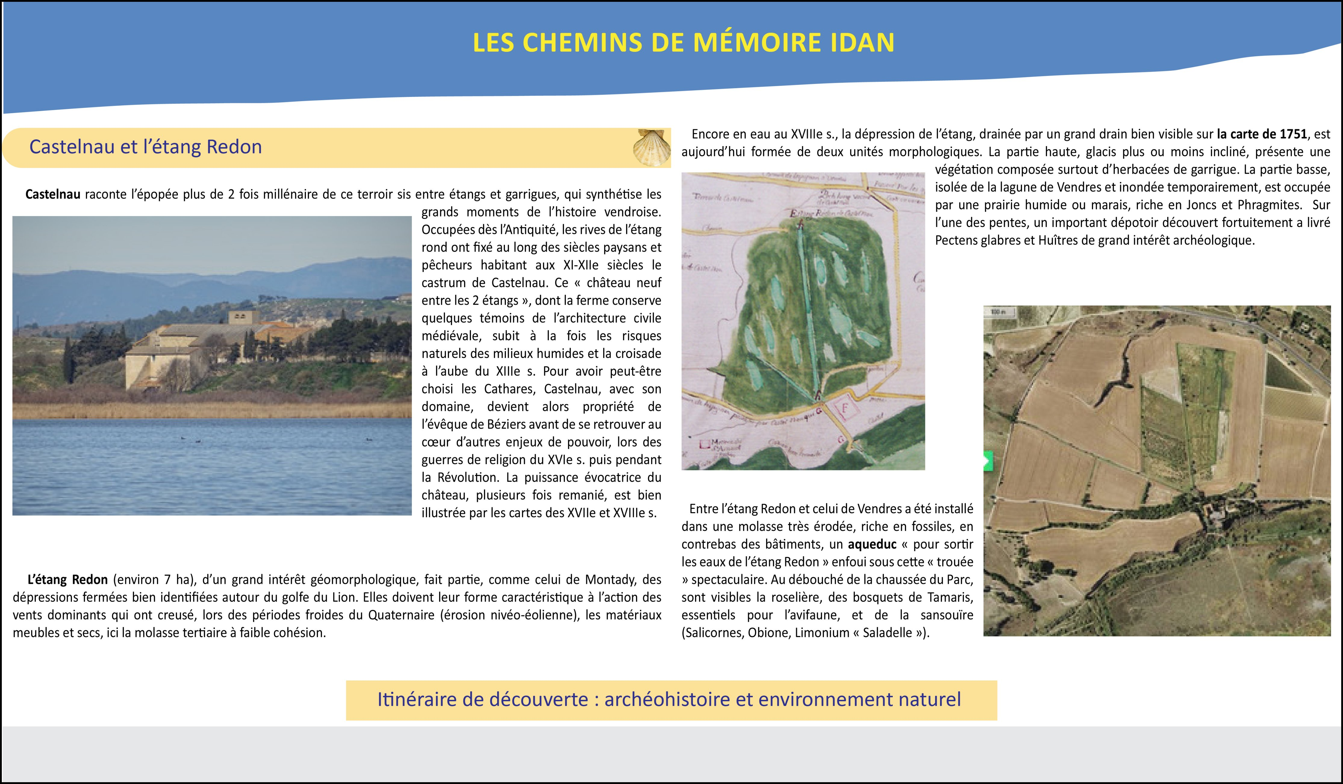 Vendres (Occitanie : Hérault) - Domaine de Castelnau "entre les deux étangs" : celui de Vendres et l'étang rond ou Redon.